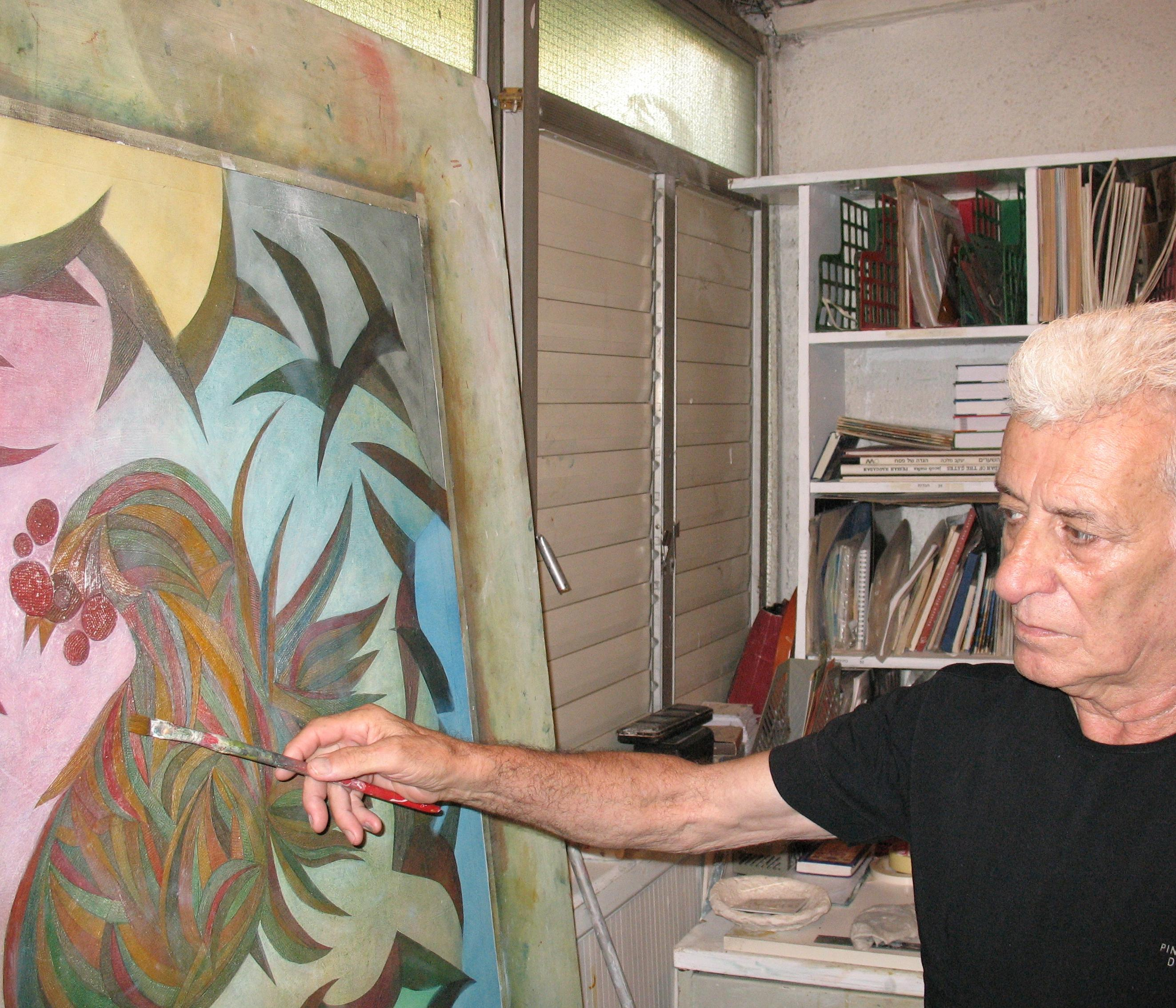 הצייר יעקב מלכה